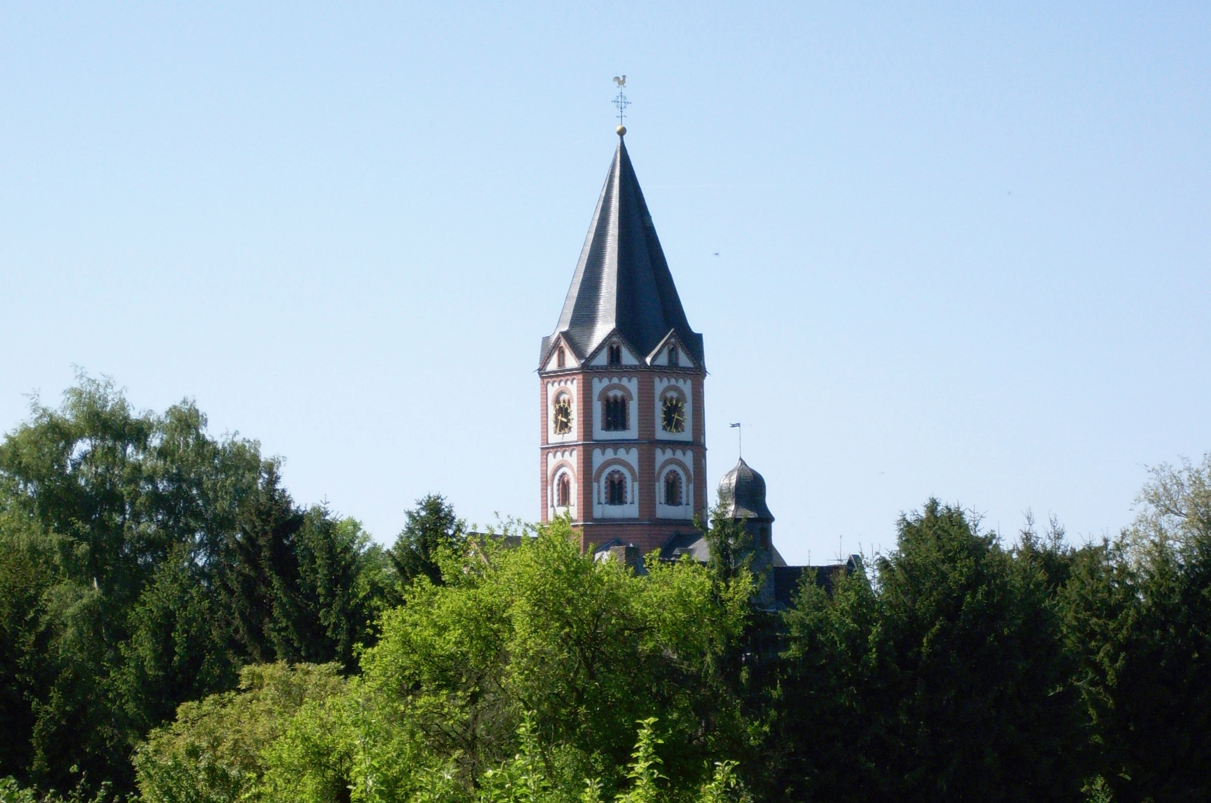 Düsseldorf-Gerresheim Blick vom Waldrand auf den Ort mit Basilika und Quadenhof